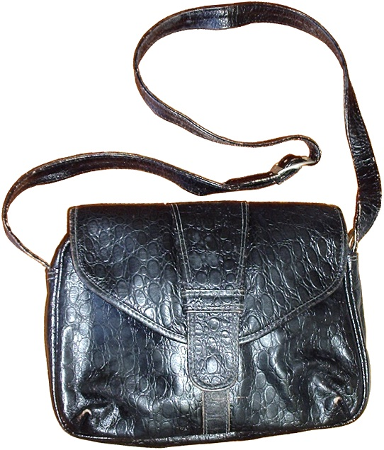 Bolsa de policial feminina da Polícia Militar do Paraná, em 1984.